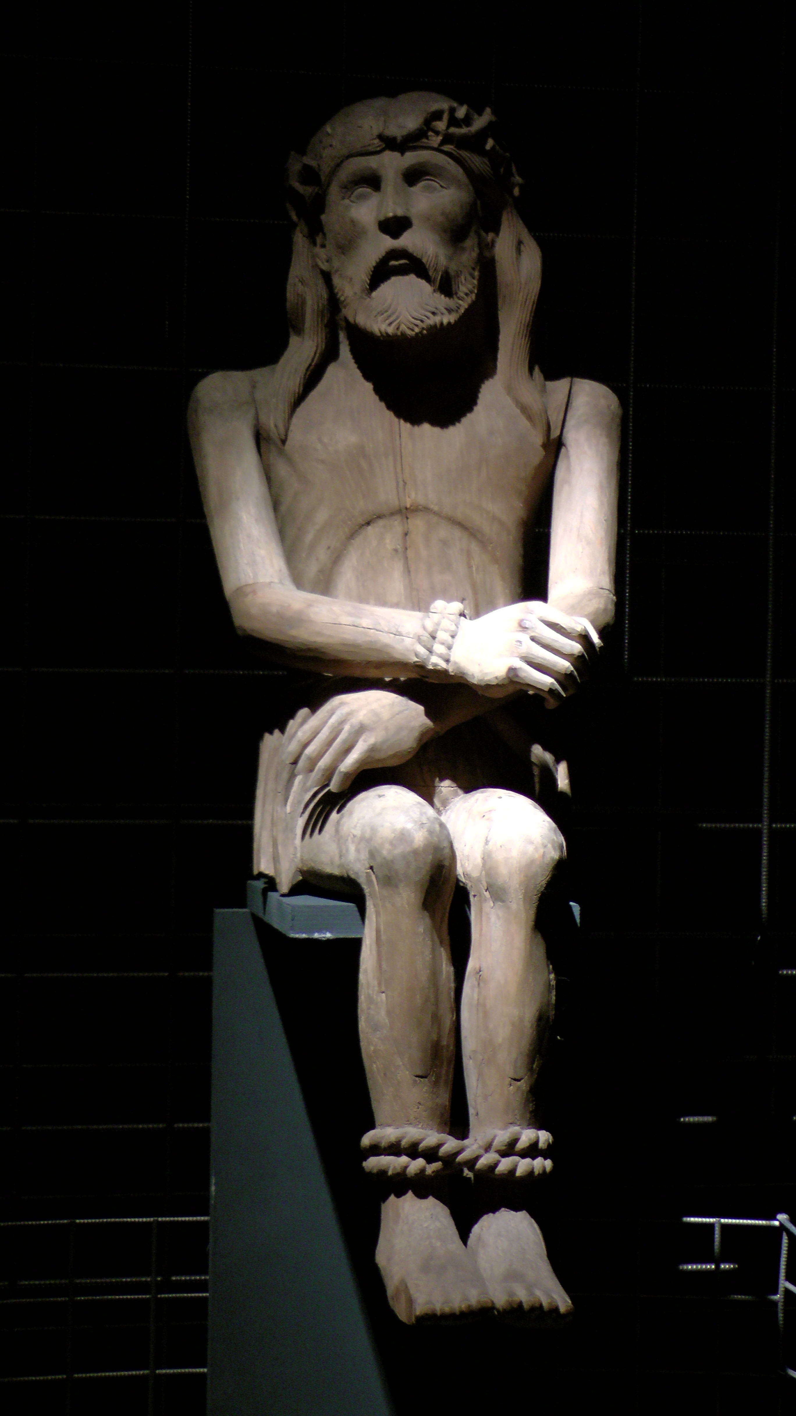 Христос в темнице, XIX век. Дерево, резьба. Фотография сделана на выставке "Христос в темнице" в Санкт-Петербурге